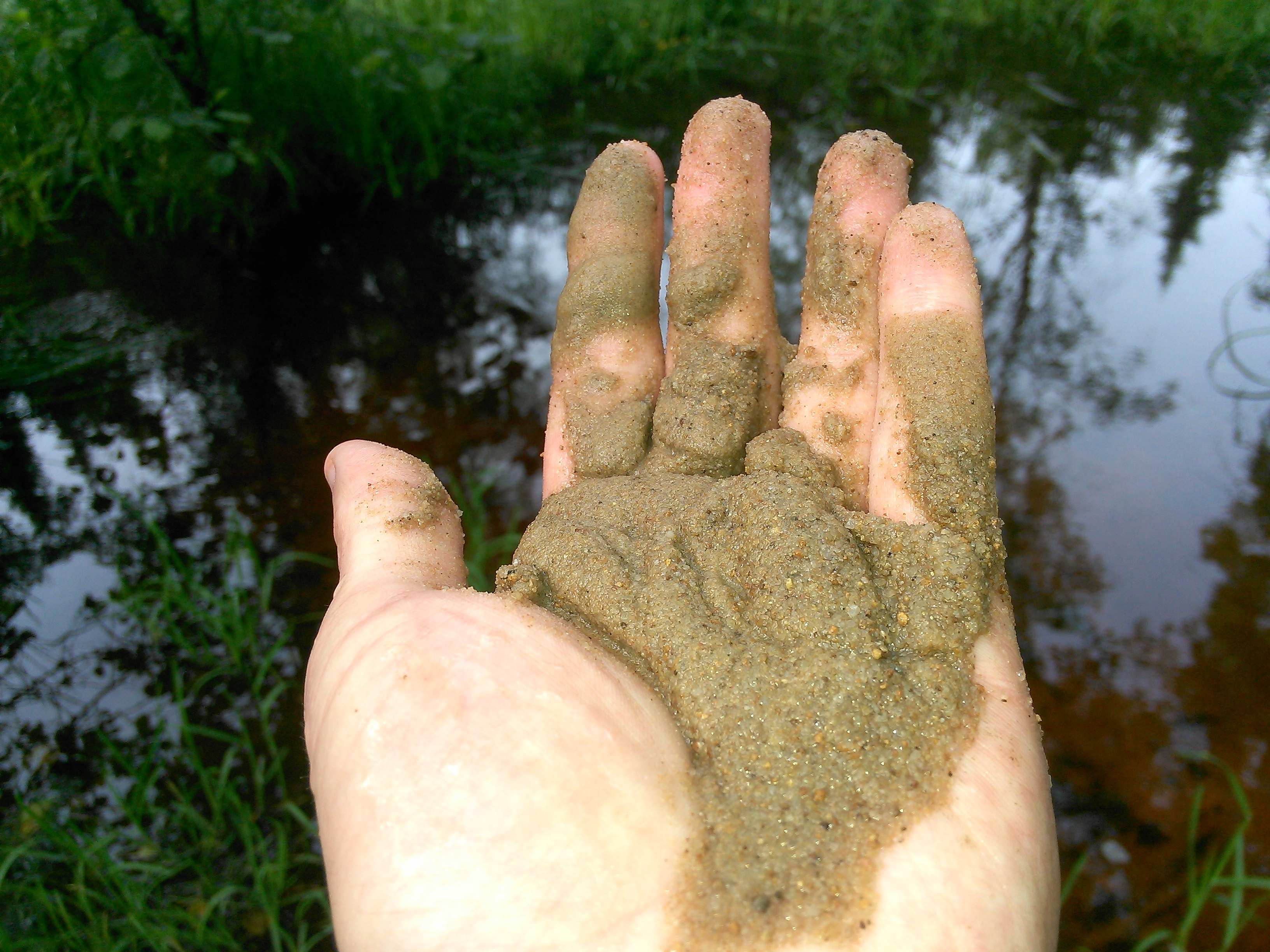 Písek.